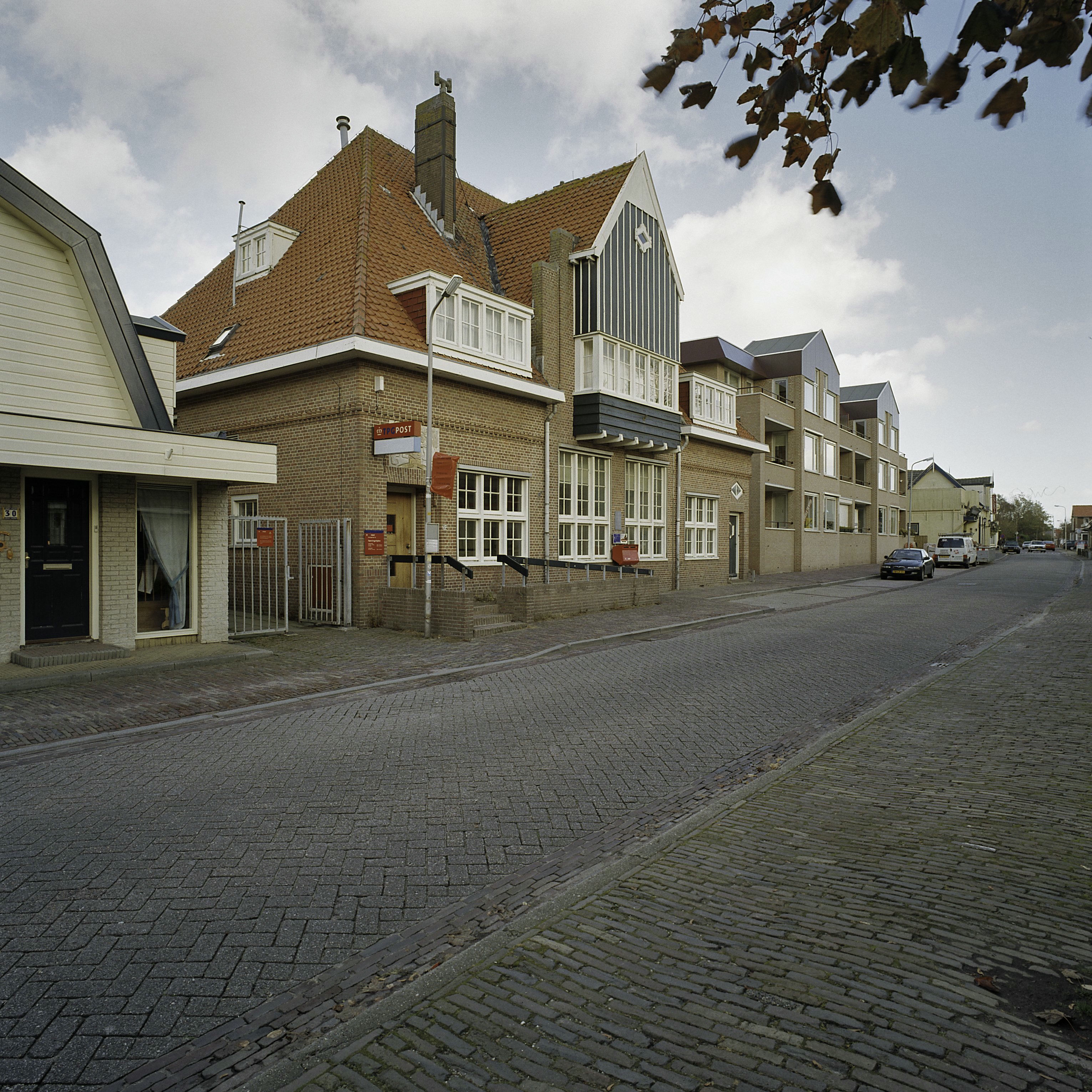 Postkantoren: Postkantoor, overzicht voorgevel vanaf straatzijde (opmerking: Gefotografeerd voor Monumenten In Nederland Noord-Holland)